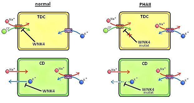 Efectes del PHAII en el transport transmembranal d'ions de Na, Cl i K